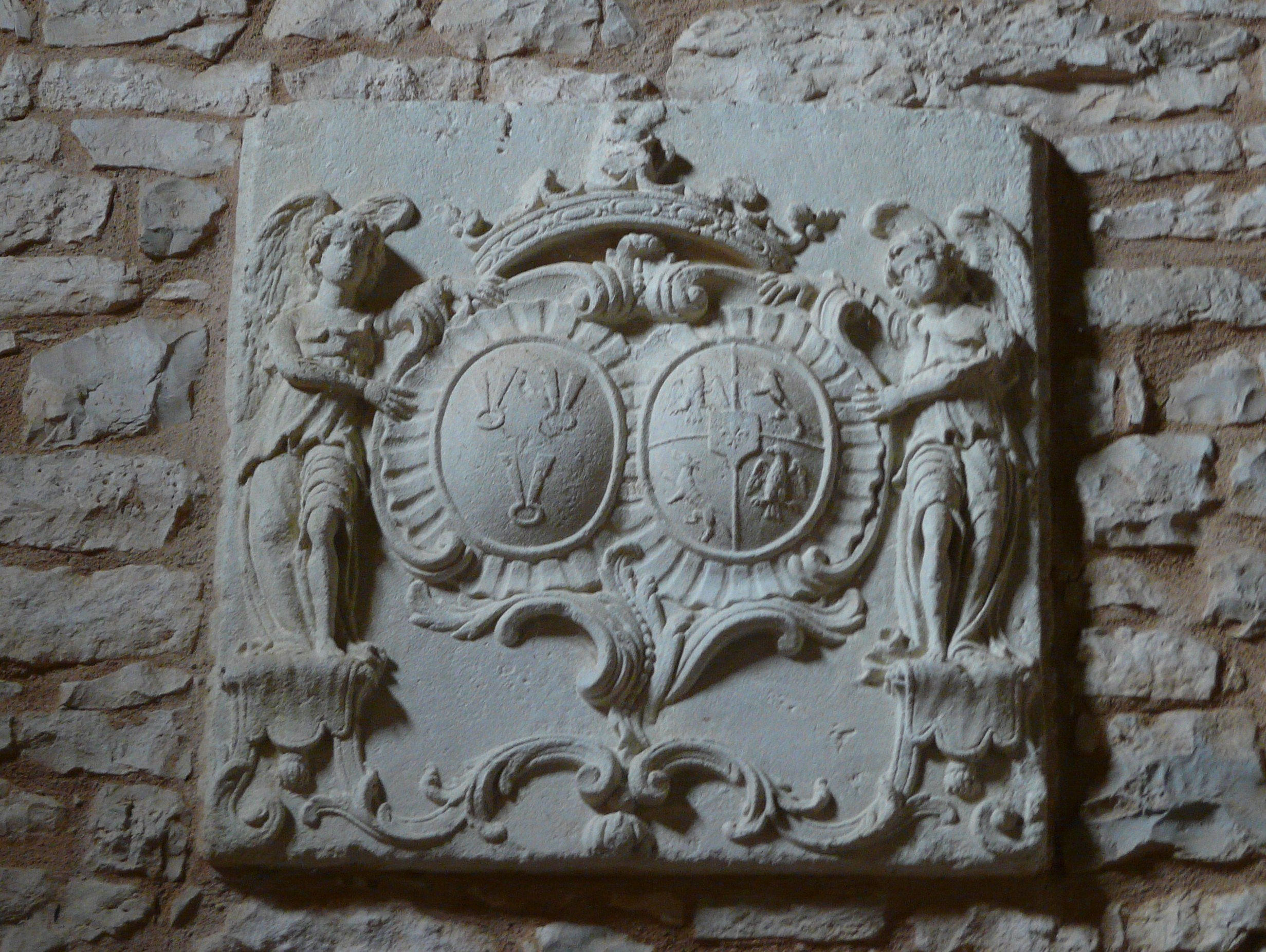 Blasons accolés du mariage en 1733 de Jean-Louis d'Hautefort, comte de Vaudre, marquis de Bruzac et de Boutteville, baron de Marqueyssac, seigneur de la Razoire, Marche, Saint Jory, Monbayol et Gabillou, avec Anne-Marie de La Baume-Forsac ; chapelle sud, église de Gabillou, Dordogne, France.